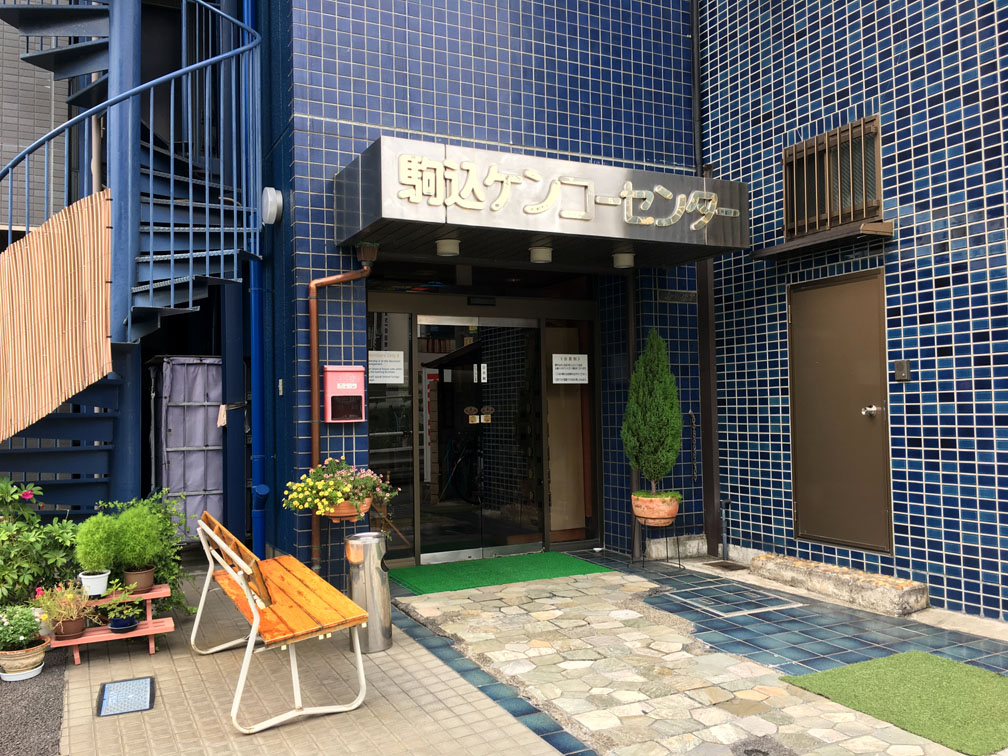 駒込ケンコーセンター（簡易宿所）